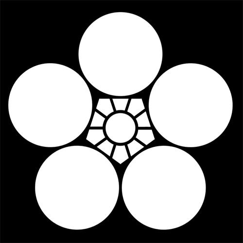 「梅鉢」紋（染抜）